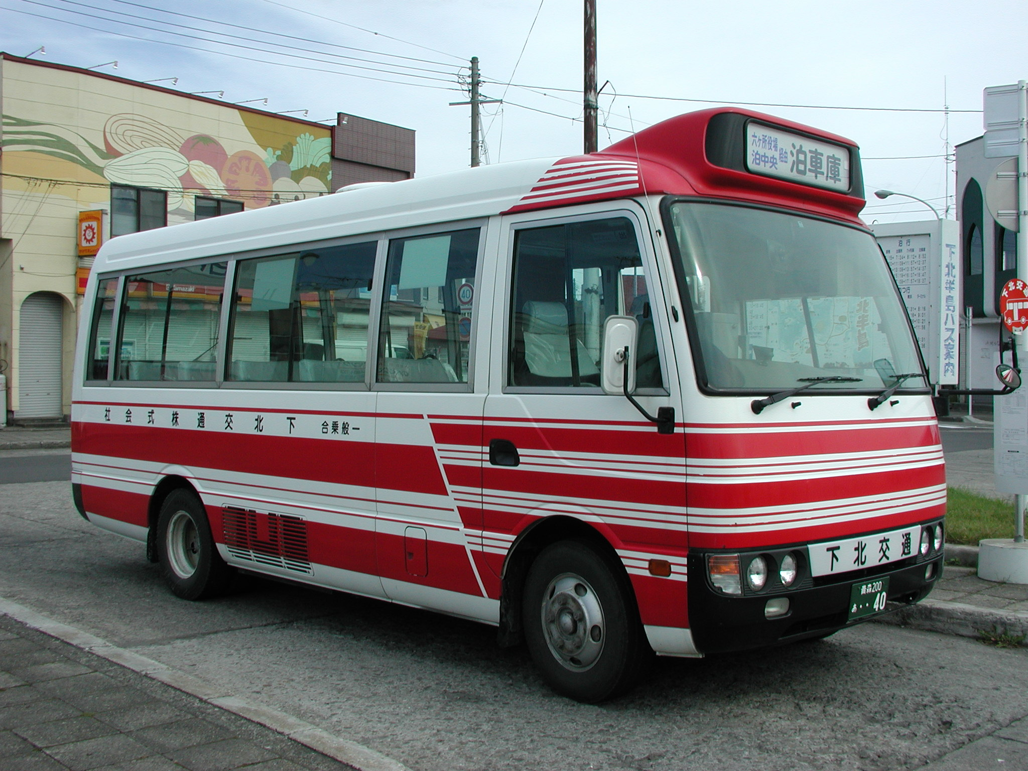 下北交通バス 一般路線塗装（三菱ふそう・ローザ：方向幕取付仕様） 野辺地駅にて